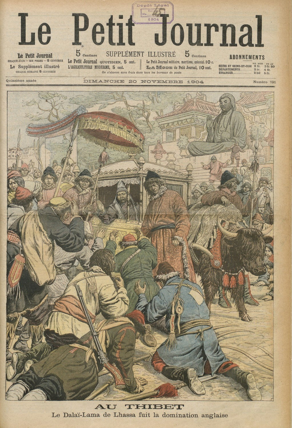 Le Petit Journal, supplément illustré du dimanche. numéro 781, 20 novembre 1904 Couverture, illustrant la fuite de Thubten Gyatso, 13e dalaï-lama devant l'invasion britannique dirigée par Francis Younghusband, d'abord dans un monastère à une vingtaine de milles de Lhassa, puis dans le monastère Gandan à Ourga, capitale de la Mongolie-Extérieure dans l'Empire Mandchou[1].